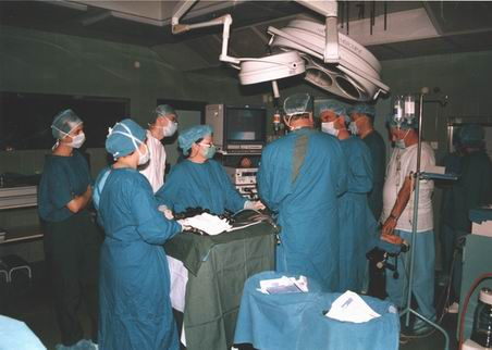 Operaciona sala VB Niš